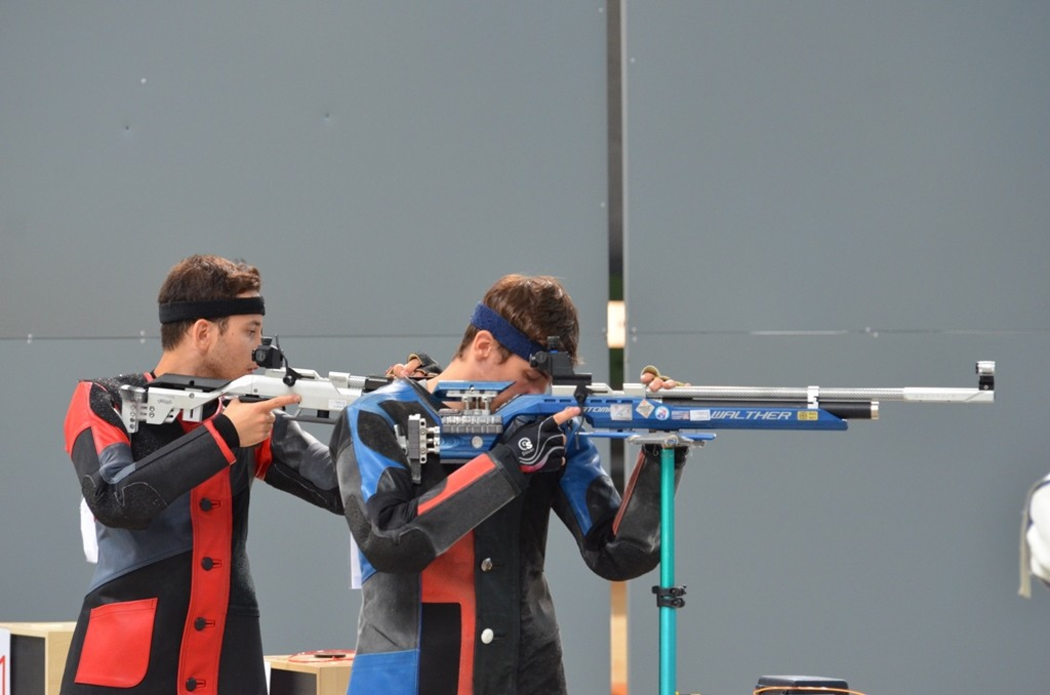 סער ינקו קלע רובה אוויר אליפות עולם קליעה רוסיה 2016, שם קבע שיא עולמי במוקדמות.